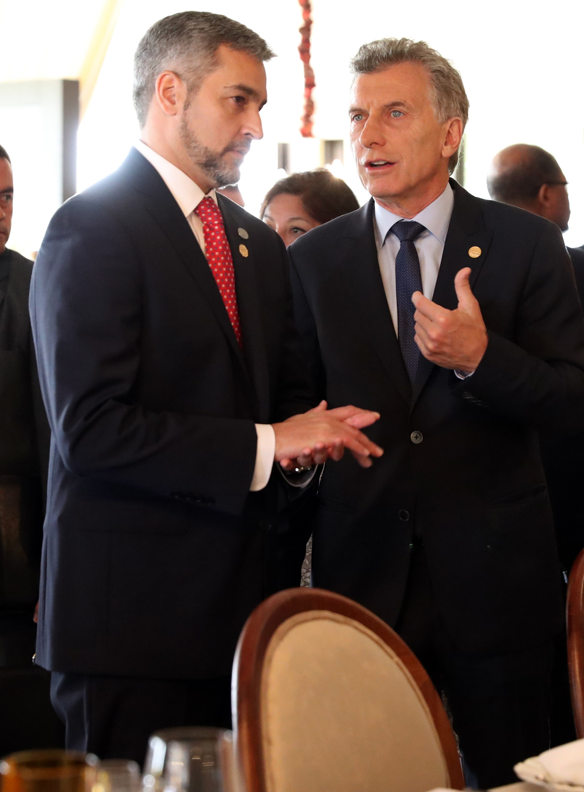 El presidente Macri expuso ante la Cumbre de Jefes de Estado del Mercosur durante el encuentro realizado en la localidad turística de Bento Goncalves, en el sur de Brasil, de la que participó junto al mandatario local, Jair Bolsonaro, el presidente de Paraguay, Mario Abdo, y la vicepresidente de Uruguay, Lucía Topolansky.